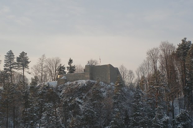 Ruiny zamki - Muszyna 29.12.2010